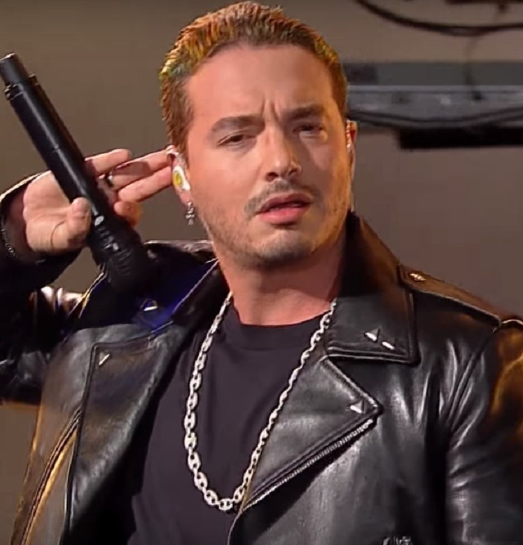 Directamente desde Medellín, Colombia, José Álvaro Osorio Balvin, conocido por su nombre artístico como J BALVIN, se presenta por primera ante el público chileno eligiendo al “monstruo” de la Quinta Vergara como primer jurado de su show, entregando una performance sobre el escenario que mantuvo encendida a las más de 15 mil personas que asistieron a esa noche de cierre del Festival de Viña 2017.